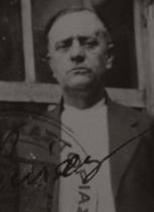 Йоанис Алванос